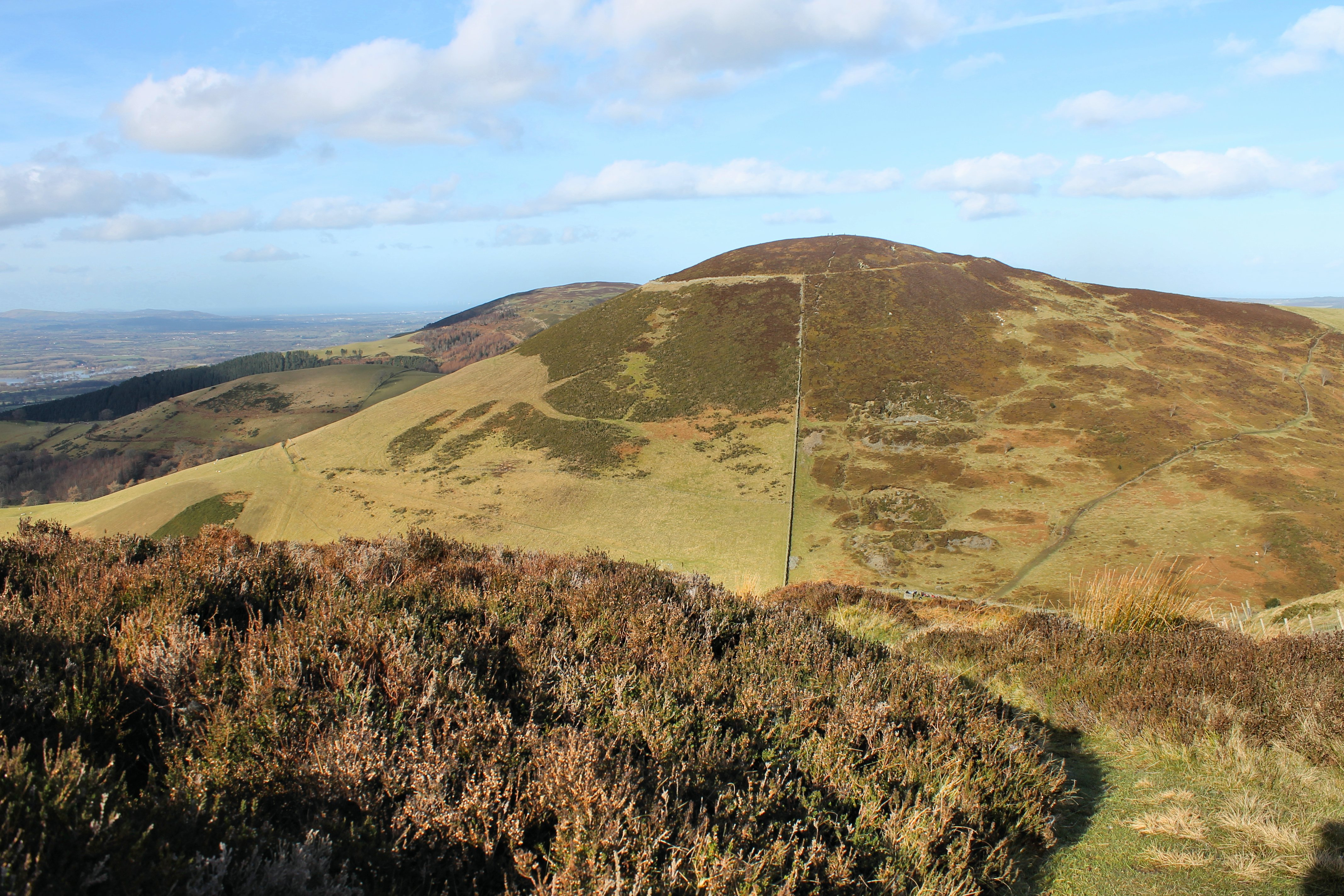 Moel Arthur, Sir Ddinbych o Foel Llys y Coed.